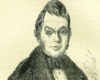 George Wombwell (1777–1850) Schausteller und Besitzer einer Wandermenagerie